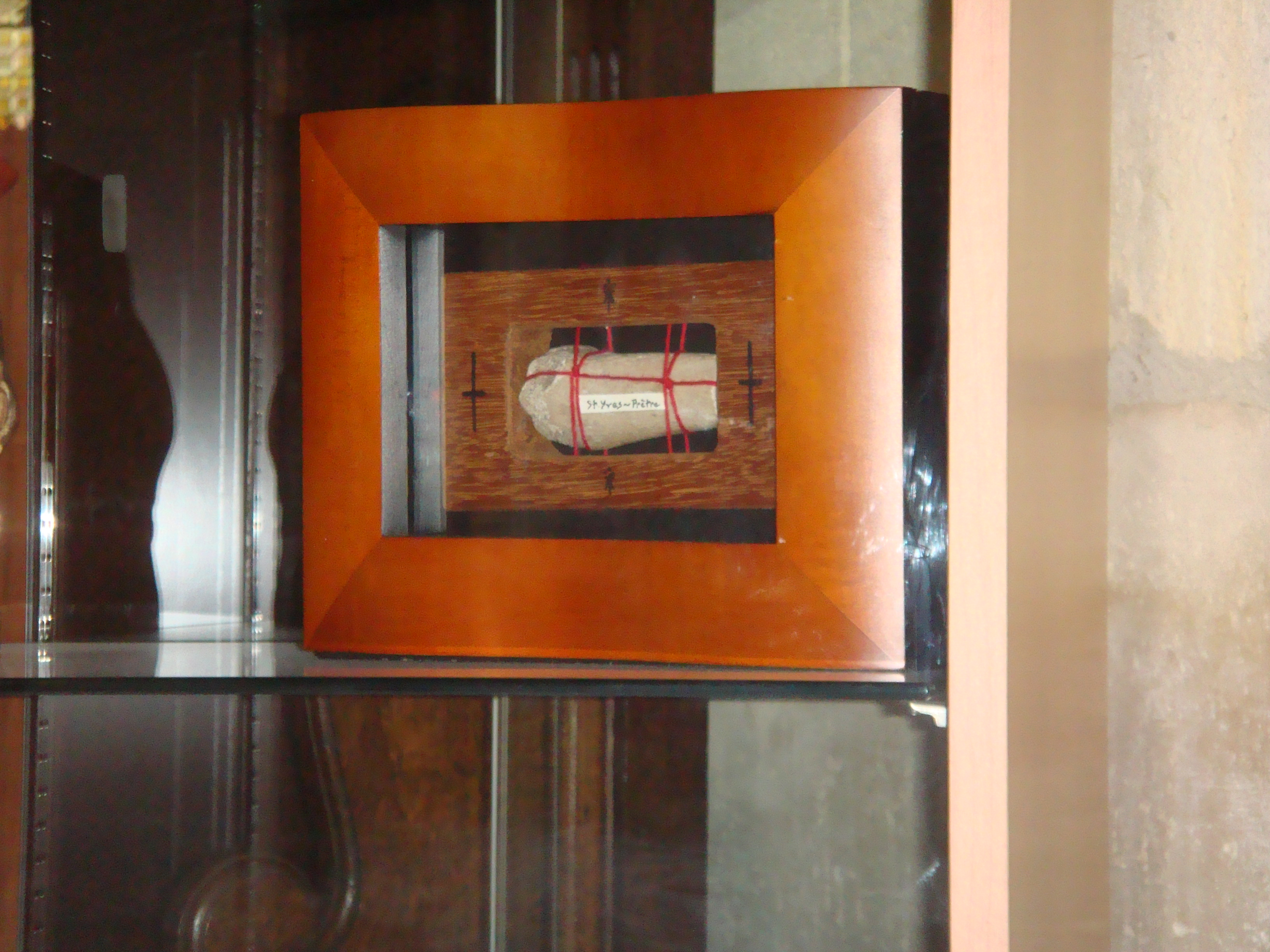 Reliques de Saint Yves dans la cathédrale Notre-Dame du Havre.